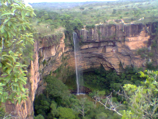 Cachoeira Véu da Noiva Parque Nacional de Chapada dos Guimarães.